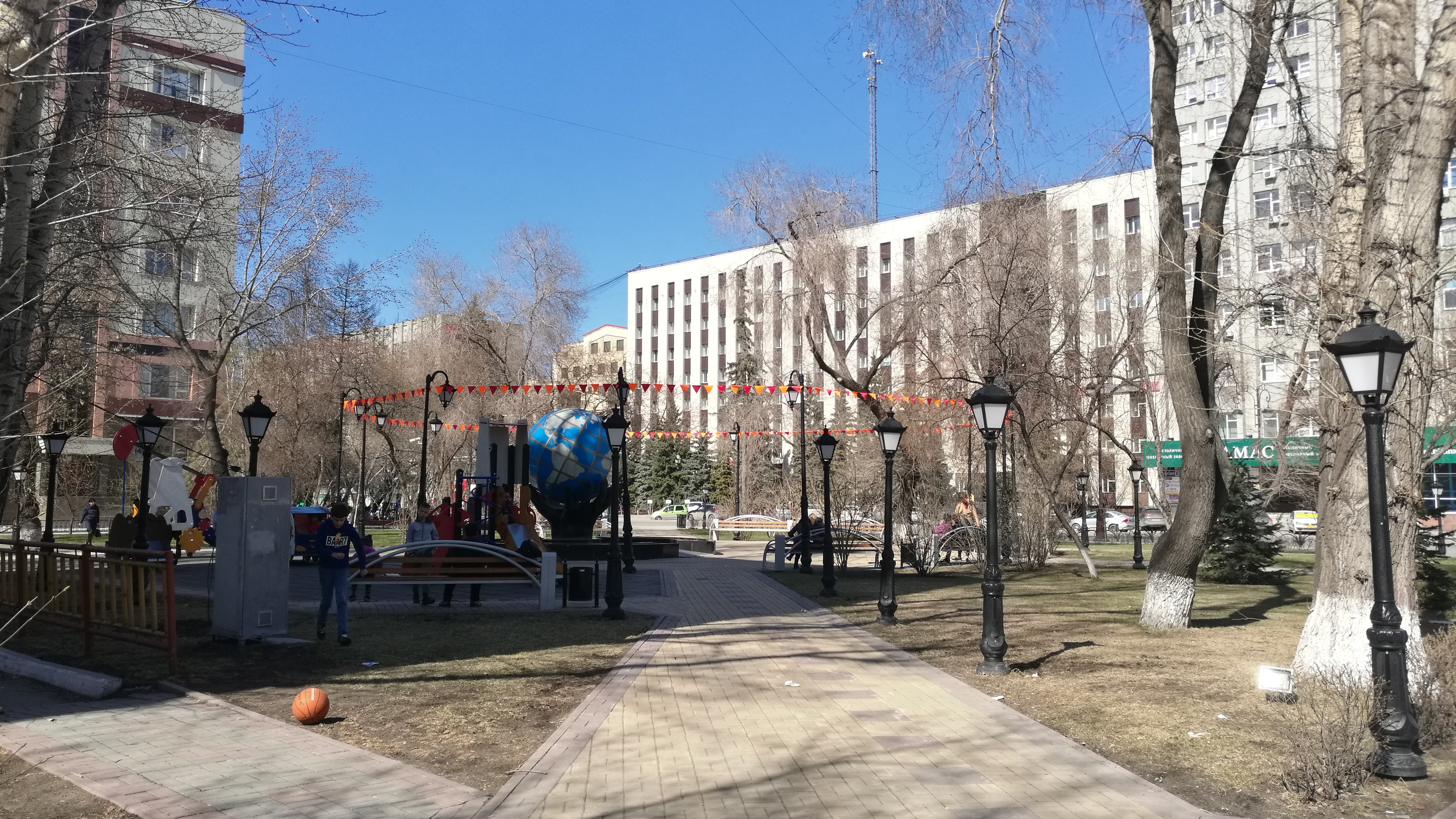 Skvaro de Naftistoj. Tjumeno, Rusio.